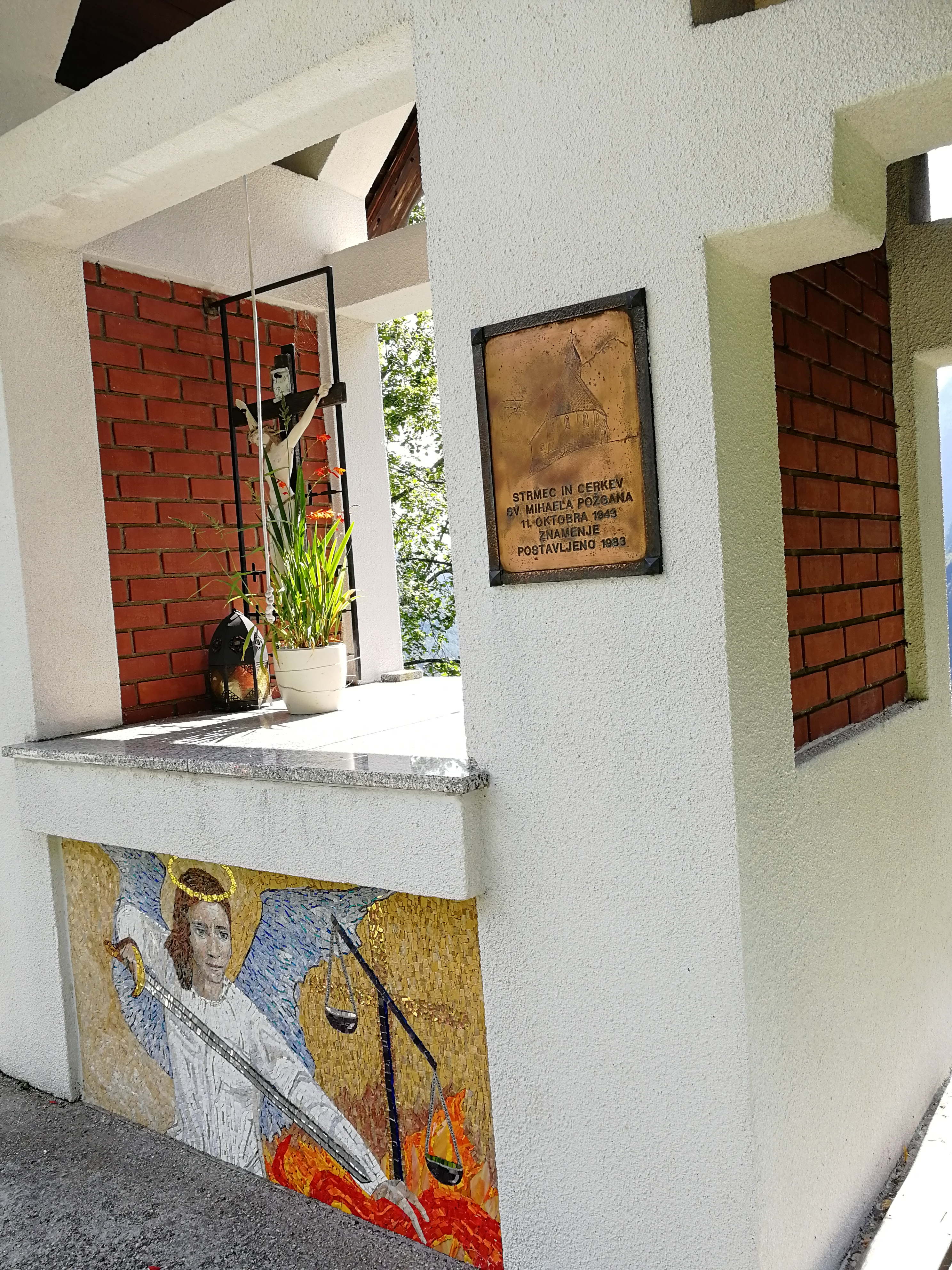 La cappelletta che ricorda la Chiesa distrutta nell'incendio